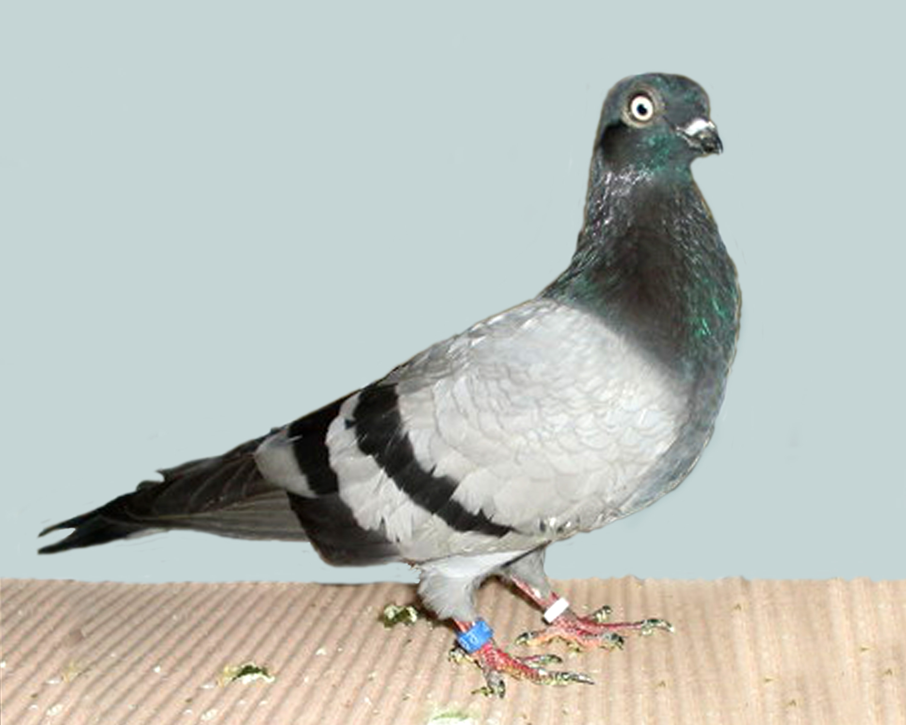 Budapest Tumbler (Blue Bar)